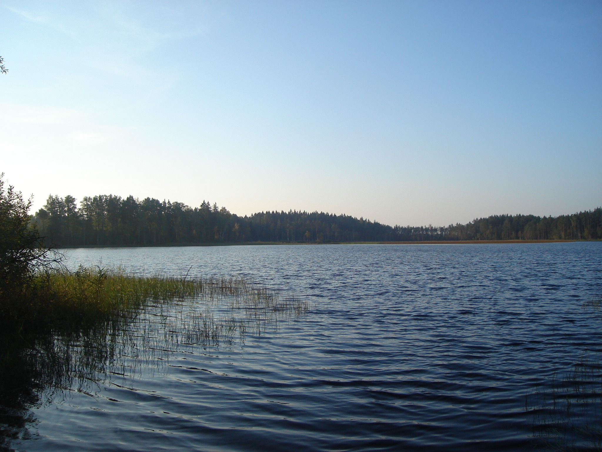 Ratnieku ezers1